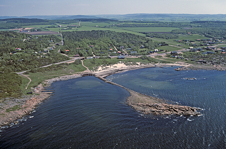 Bilden troligen från mitten av 1970-talet. Motiv: Steninge Nyckelord: Flygbilder, Riksintressen Kategori: Kust- och skärgårdsmiljöBilden troligen från mitten av 1970-talet.